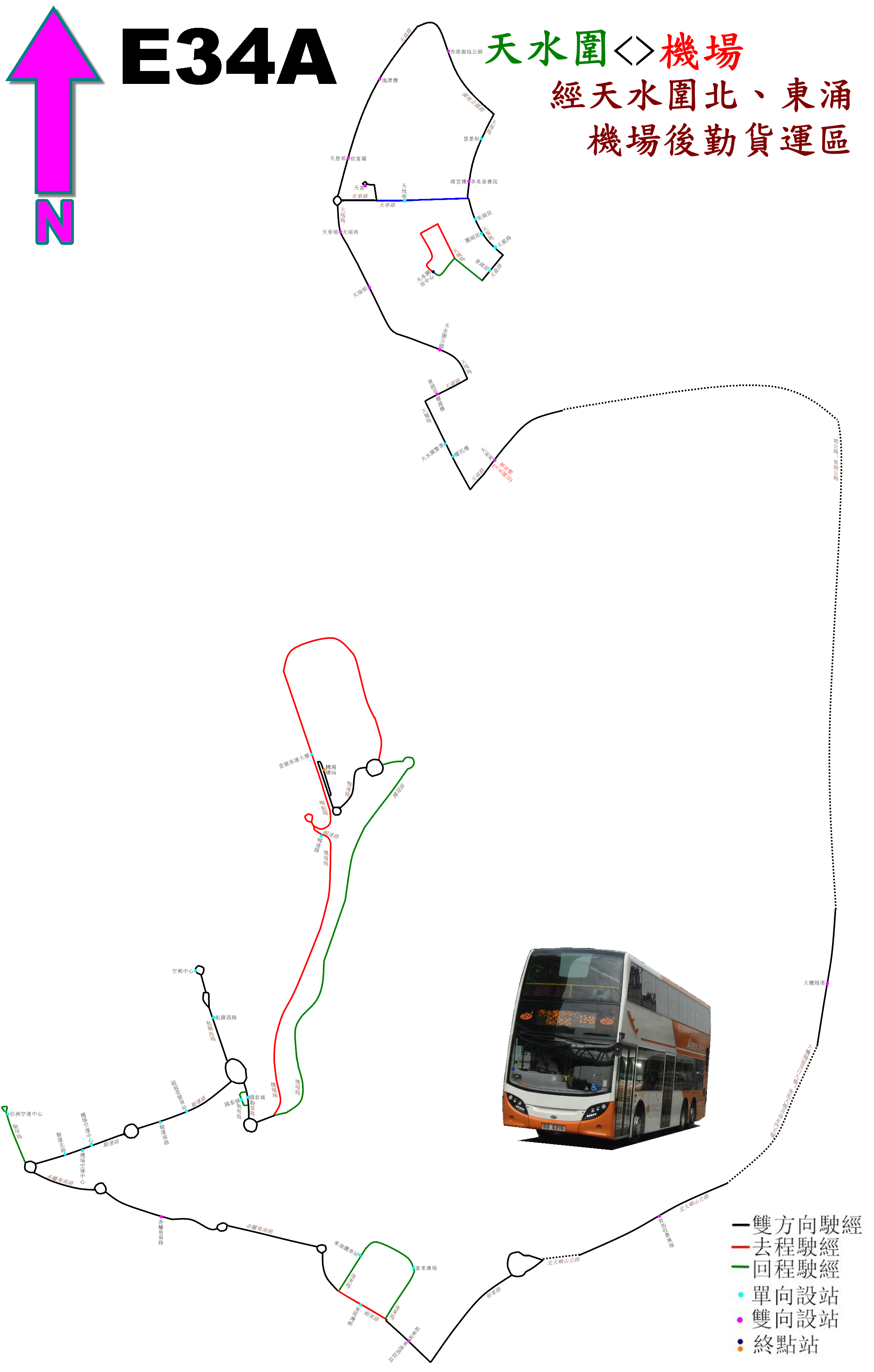 中文（香港）: 龍運巴士E34A線的走線圖